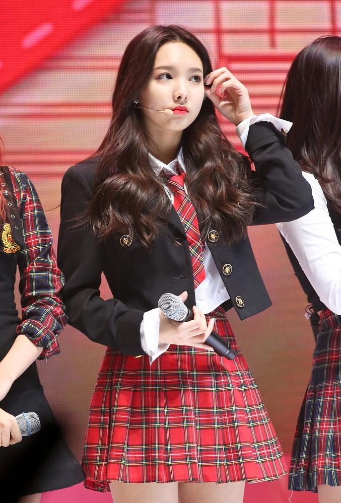 [15.12.27] SAF 박소현의 러브게임 직찍 ( 트와이스 나연, 정연, 모모, 사나, 지효, 미나, 다현, 채영, 쯔위 )